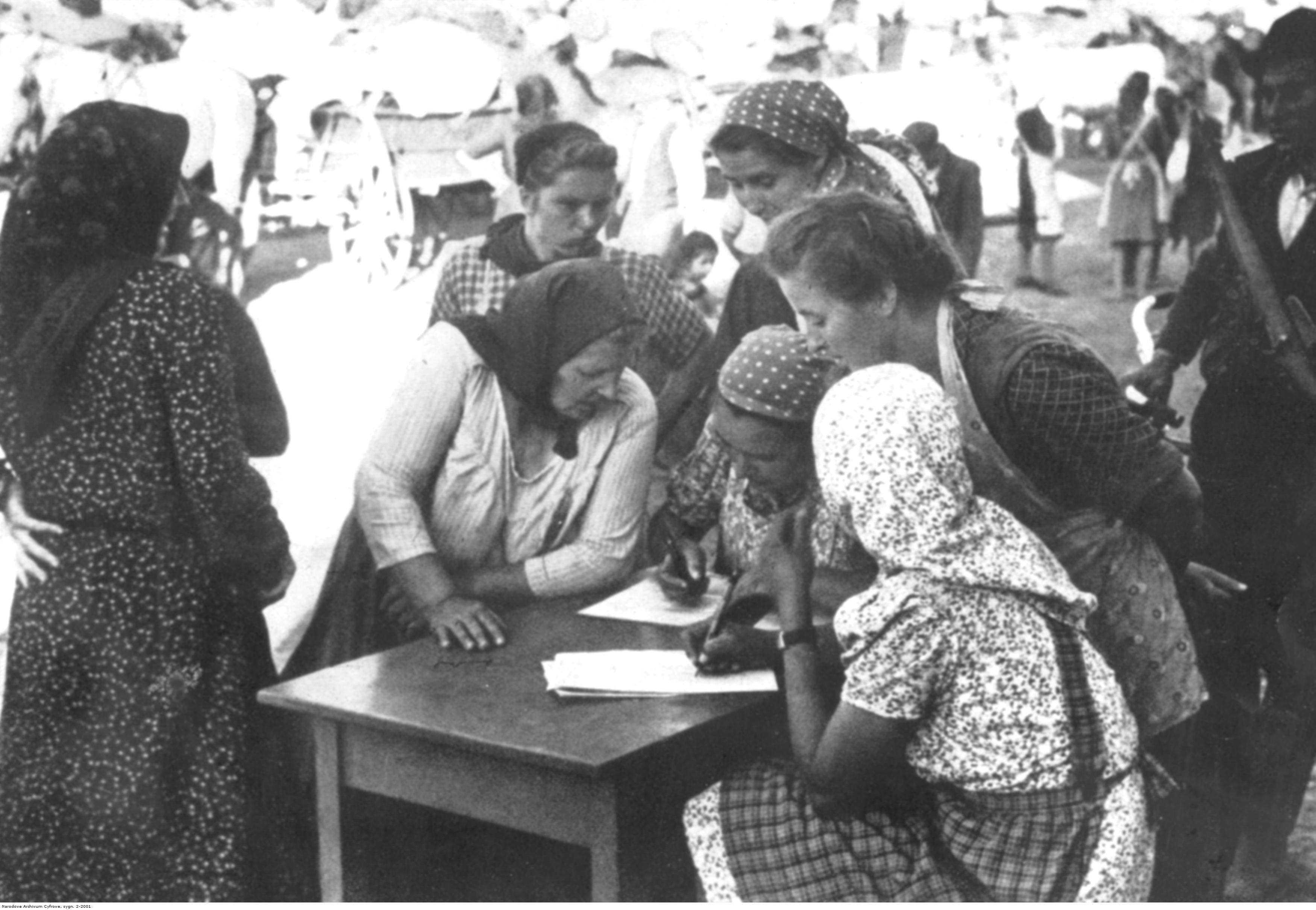 Ewakuacja ludności niemieckiej z terenu Banatu. Kobiety wpisują się na listę ewakuacyjną.